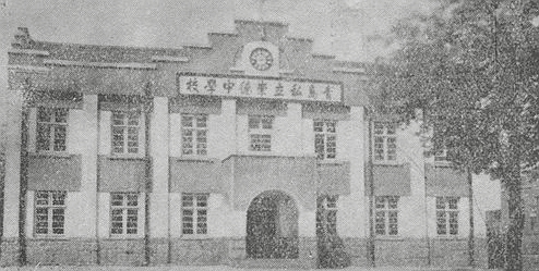 青岛崇德中学陶里克楼